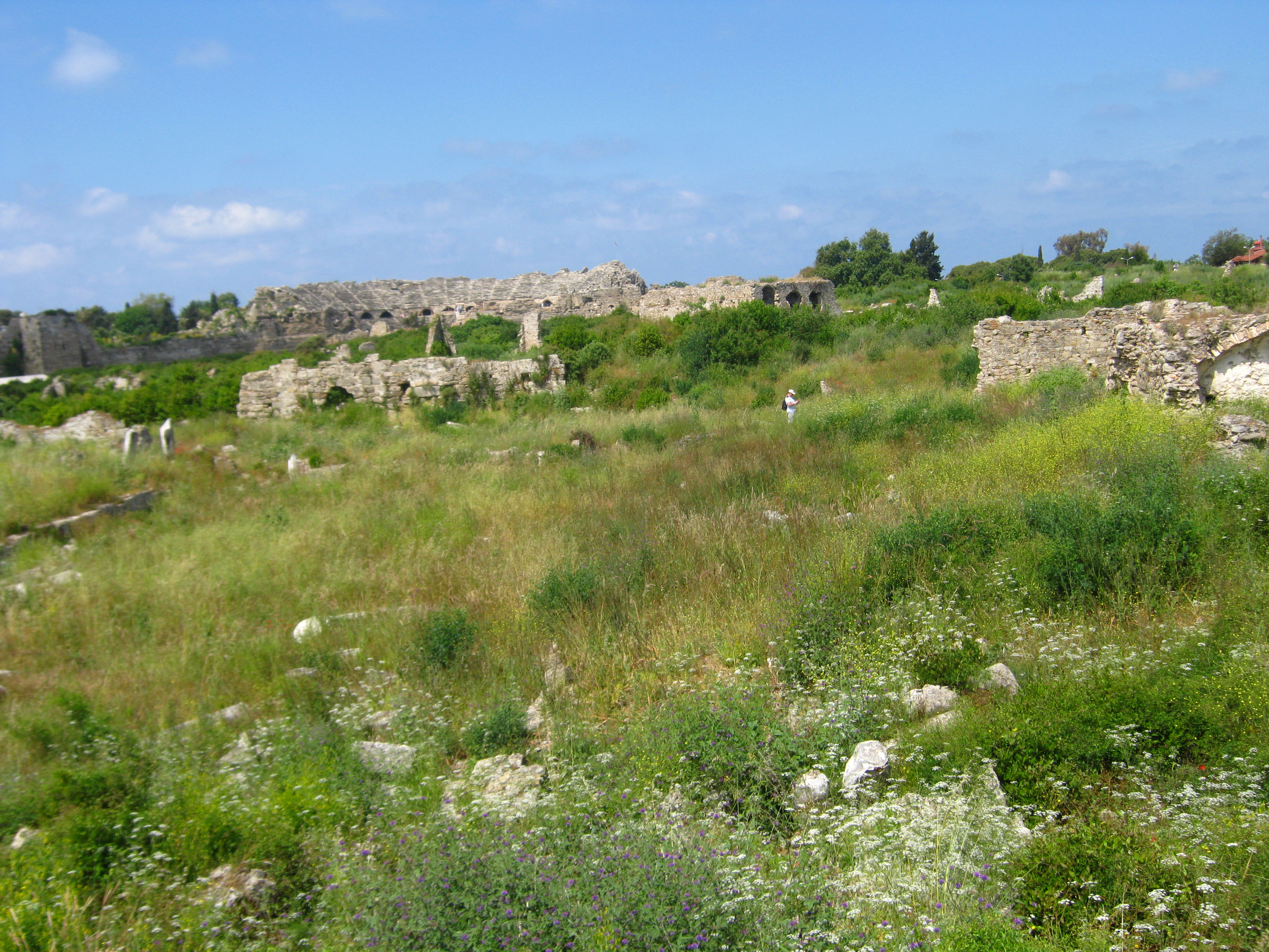 Загальний вигляд "Єпископської базиліки"